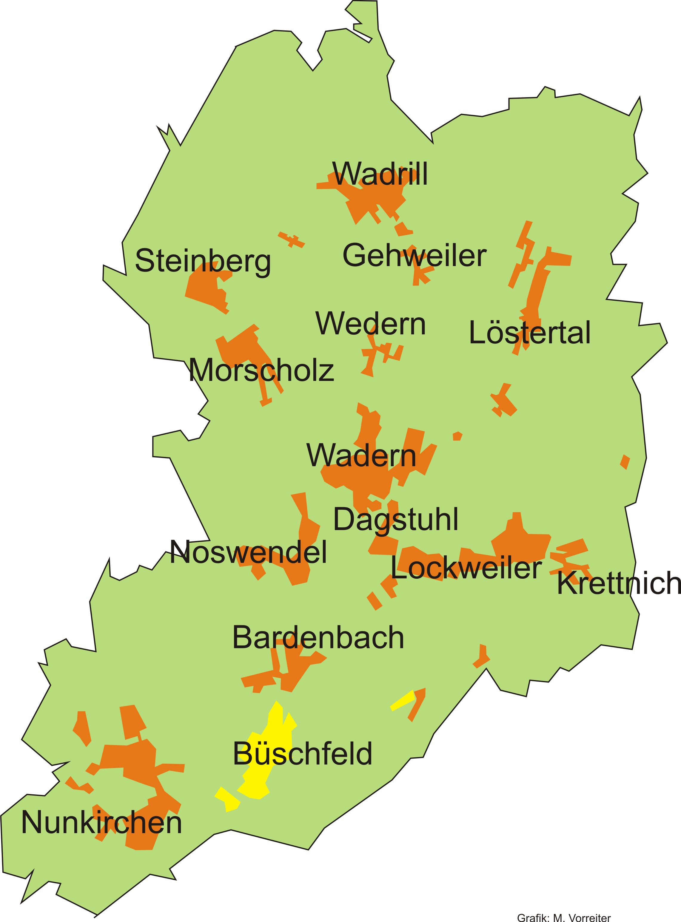 Lage des Stadtteils Büschfeld innerhalb der Stadt Wadern